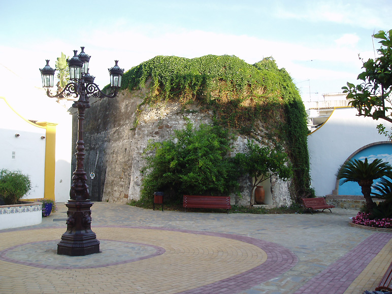 Restos del castillo de Estepona, provincia de Málaga.